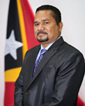 Marcos Xavier, Abgeordneter des Nationalparlaments Osttimros